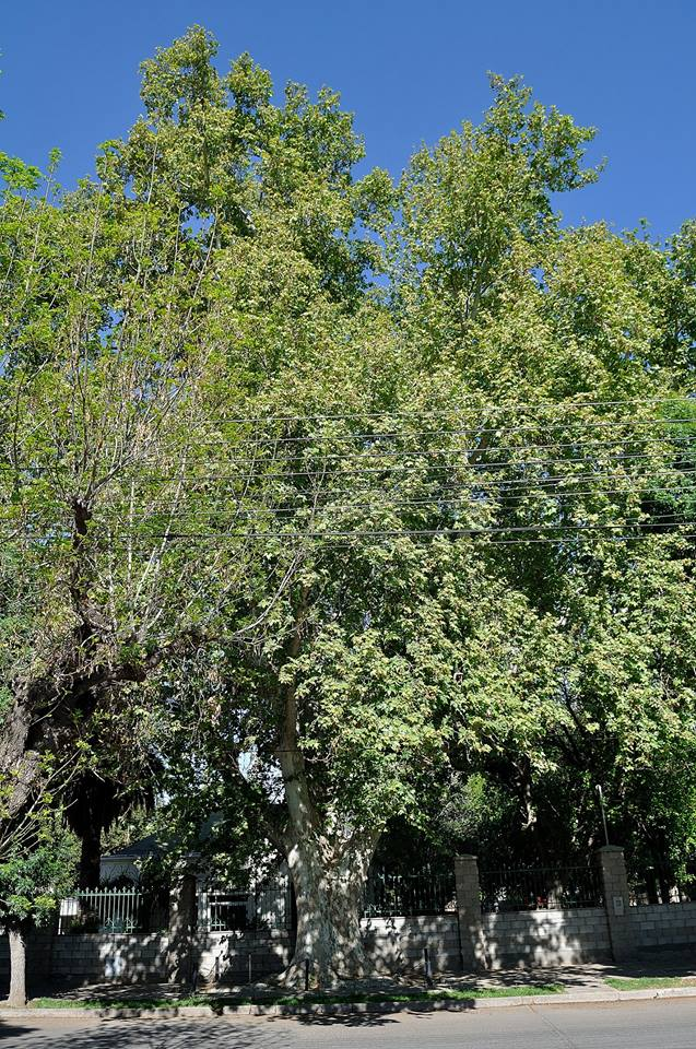 Leslie Besone, escuela 4-151 Dr. Benito Marianetti; Lujan de Cuyo, Mendoza